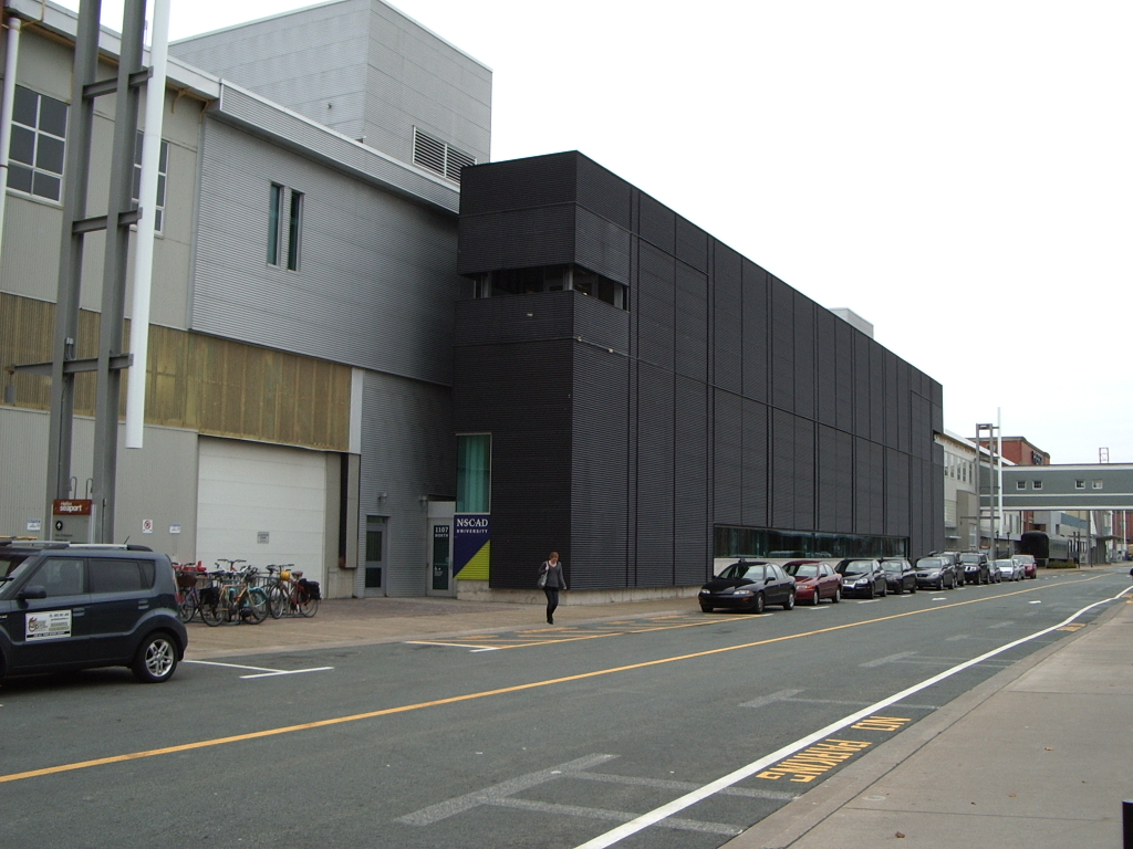 NSCAD Port Campus